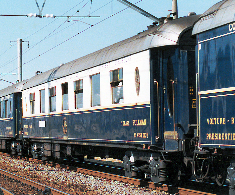 ORIENT EXPRESS '88 Pullman No.4158 DE